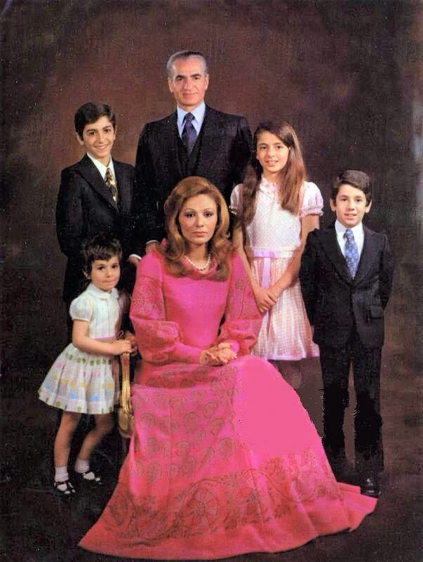 La famille impériale d'Iran